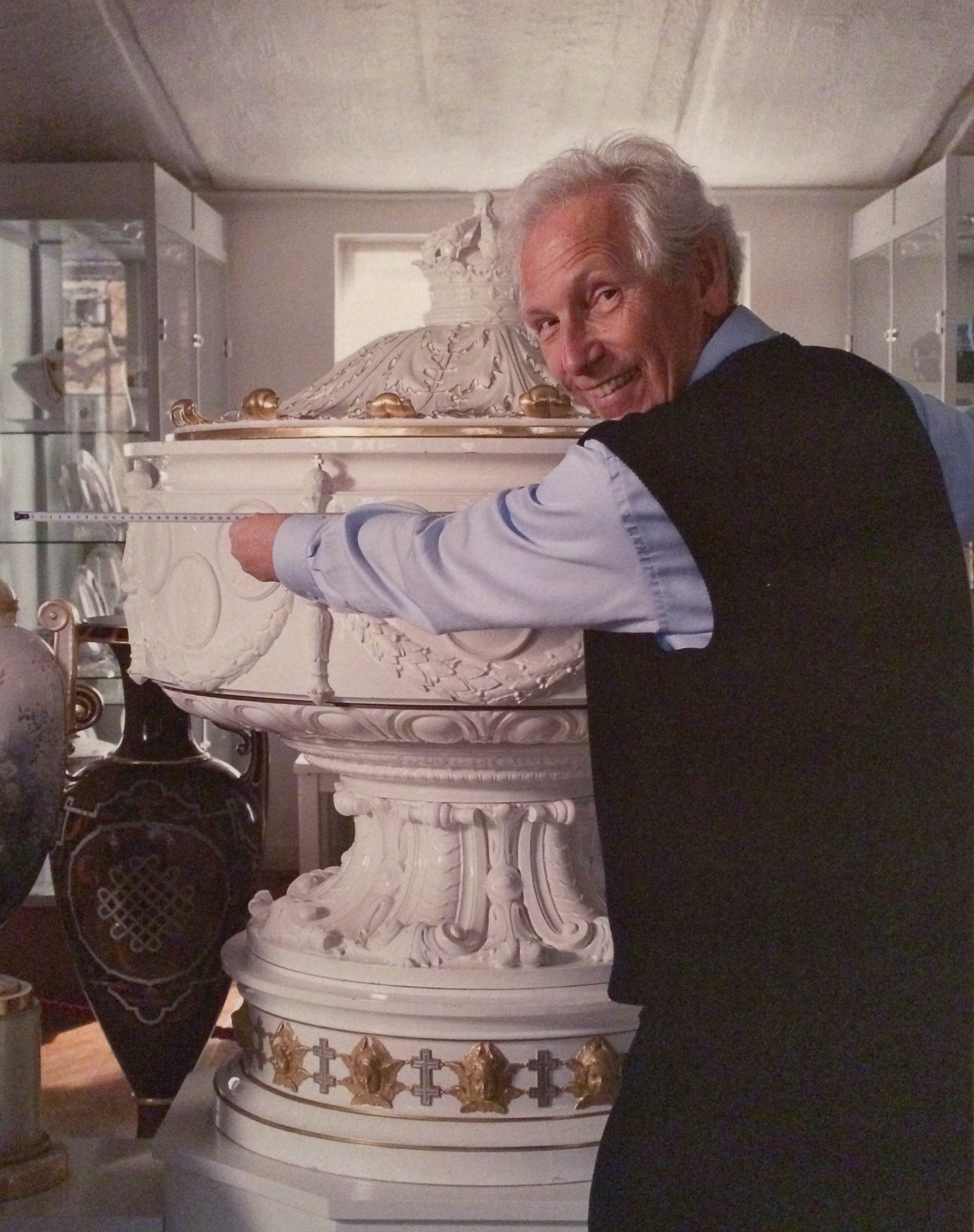 Gösta Arvidsson mäter upp ”Kungavasen” på Gustavsbergs Porslinsmuseum, som tillverkades till den stora Stockholmsutställningen 1897.